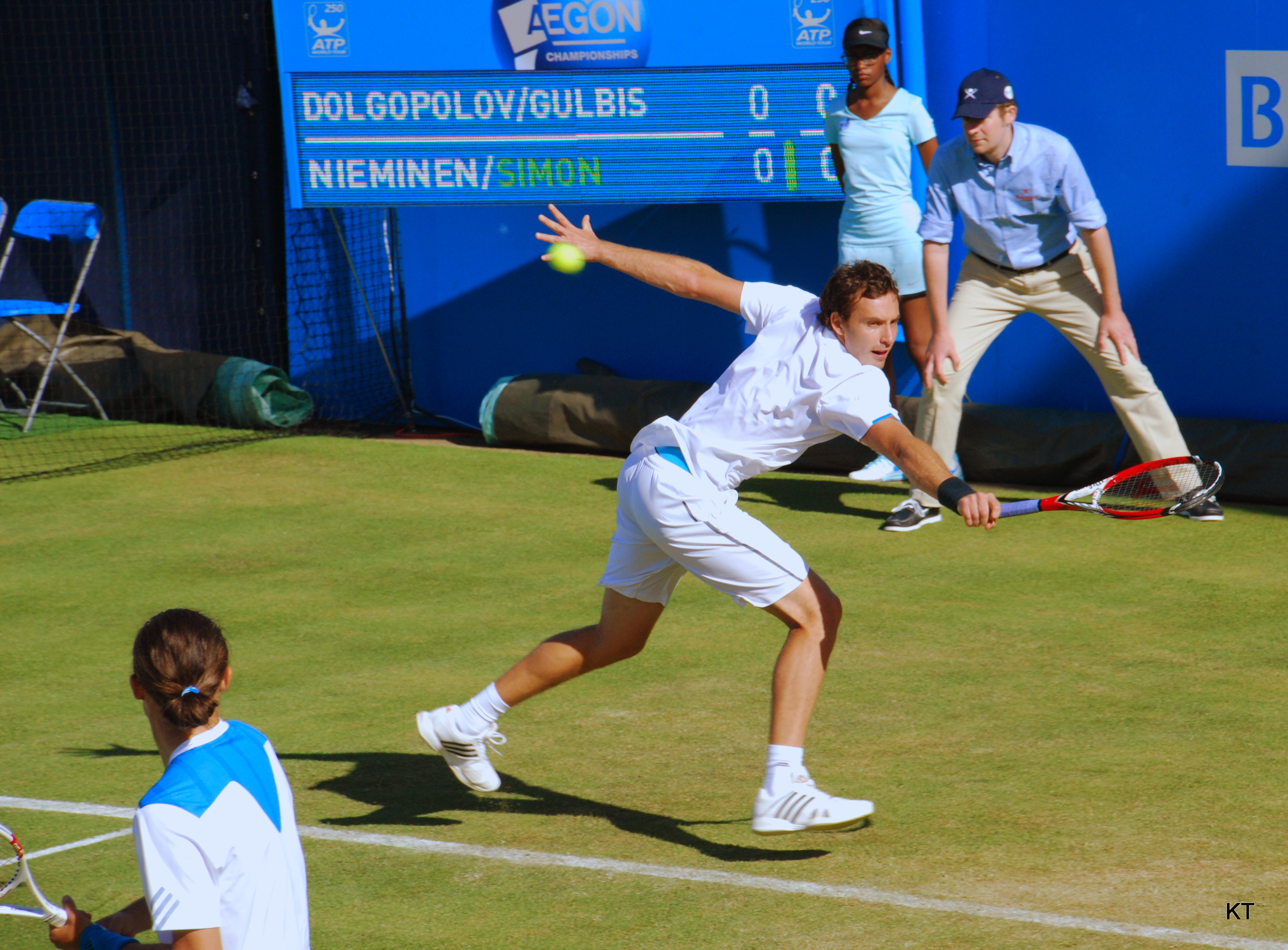 Ernests Gulbis & Alexandr Dolgopolov